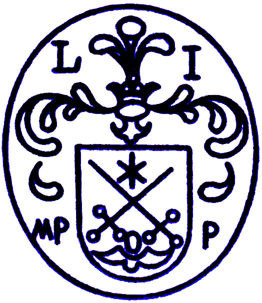 Герб пінського війта і маршалка Лукаша Єльського